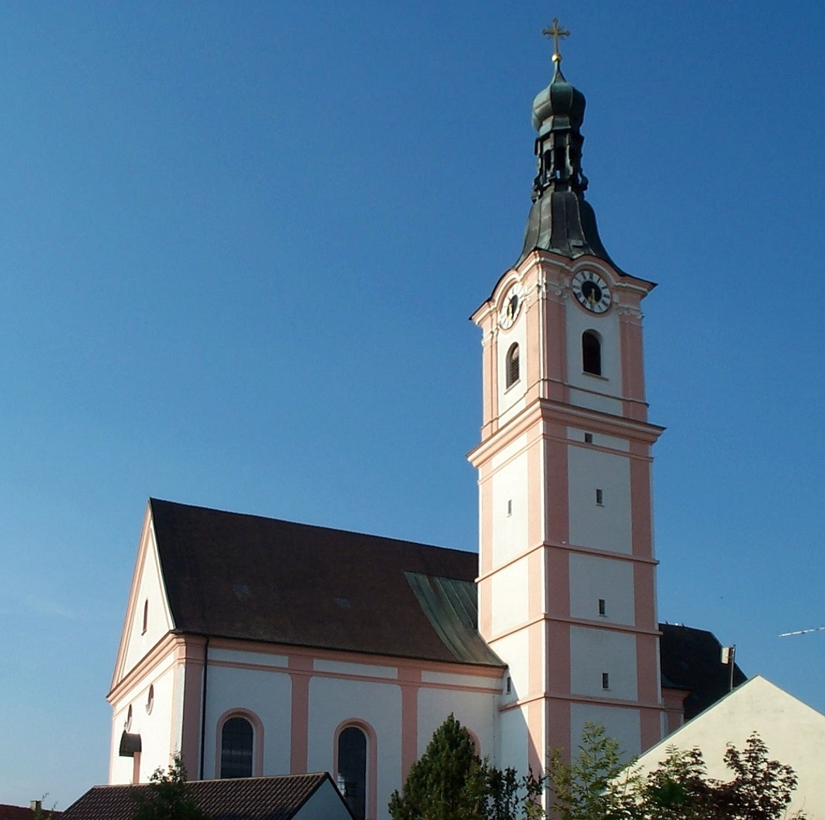 Geiselhöring Stadtpfarrkirche St. Petrus und Erasmus